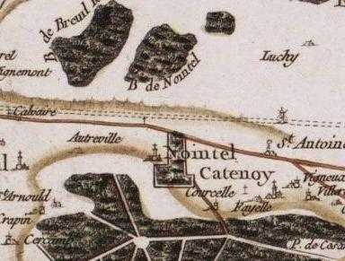 Nointel (Oise), carte de Cassini